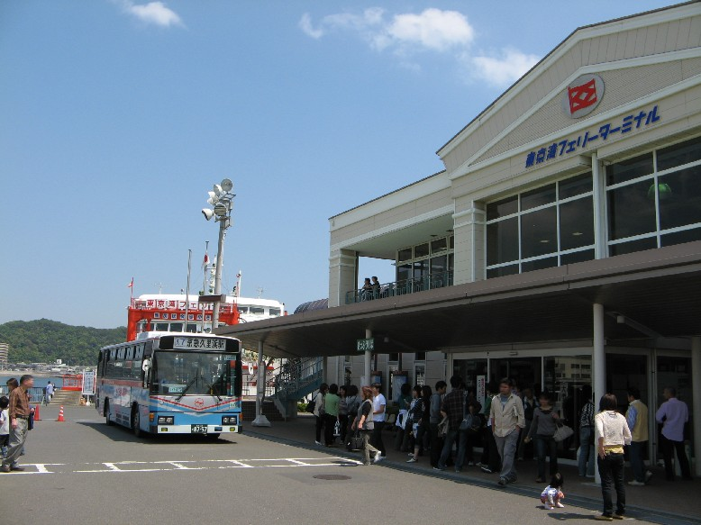 東京湾フェリーターミナル・久里浜港